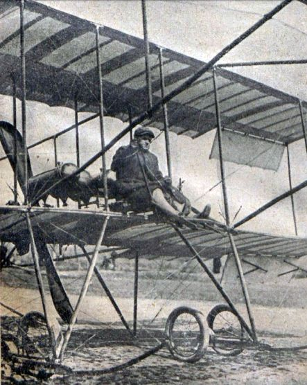 Авиатор Сергей Исаевич Уточкин